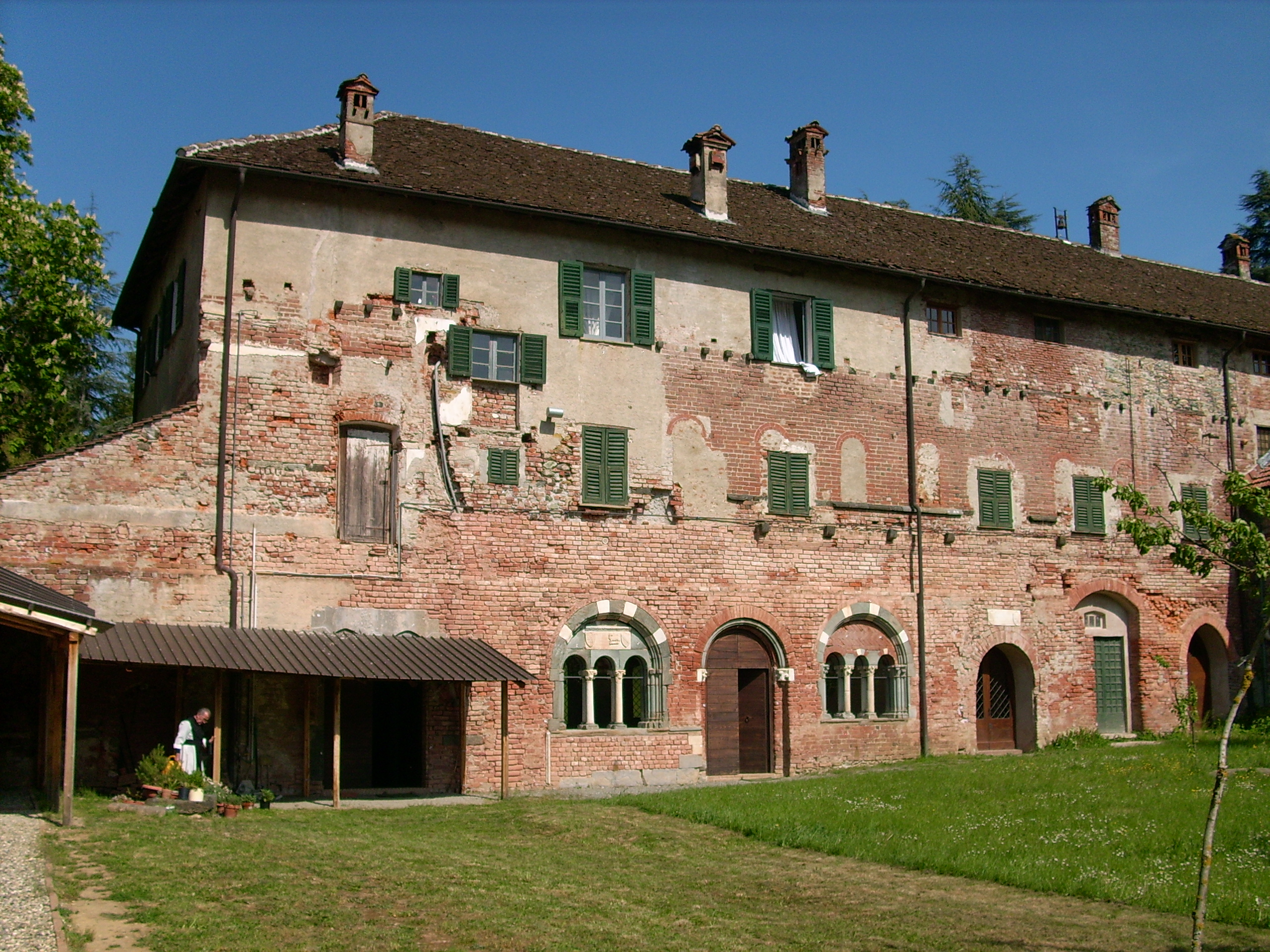 Chiostro della Badia di Tiglieto, Liguria, Italia